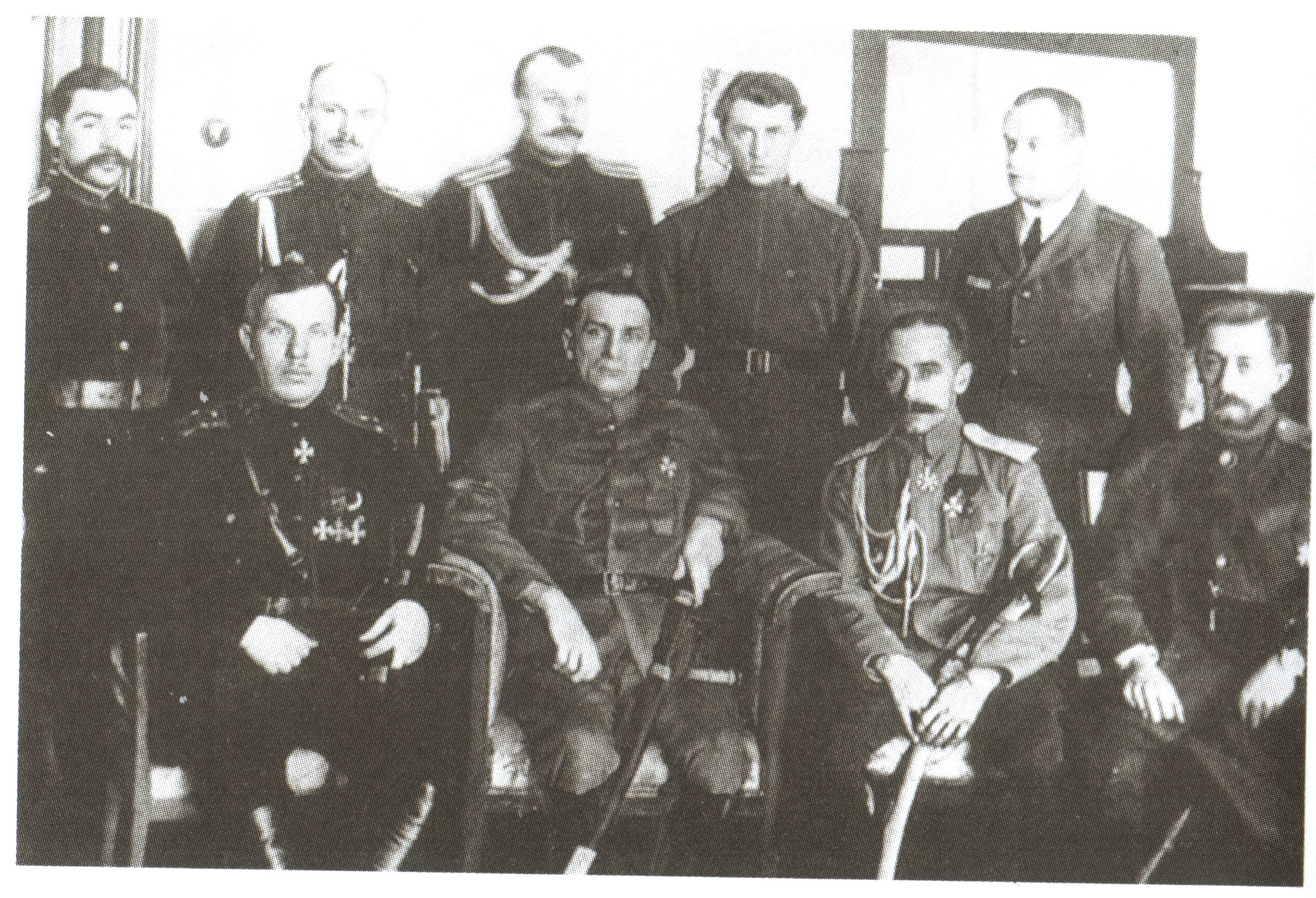 В штабе Сибирской армии. В первом ряду слева направо: командующий Р. Гайда, А.В. Колчак, начальник штаба Б.П. Богословский Февраль 1919